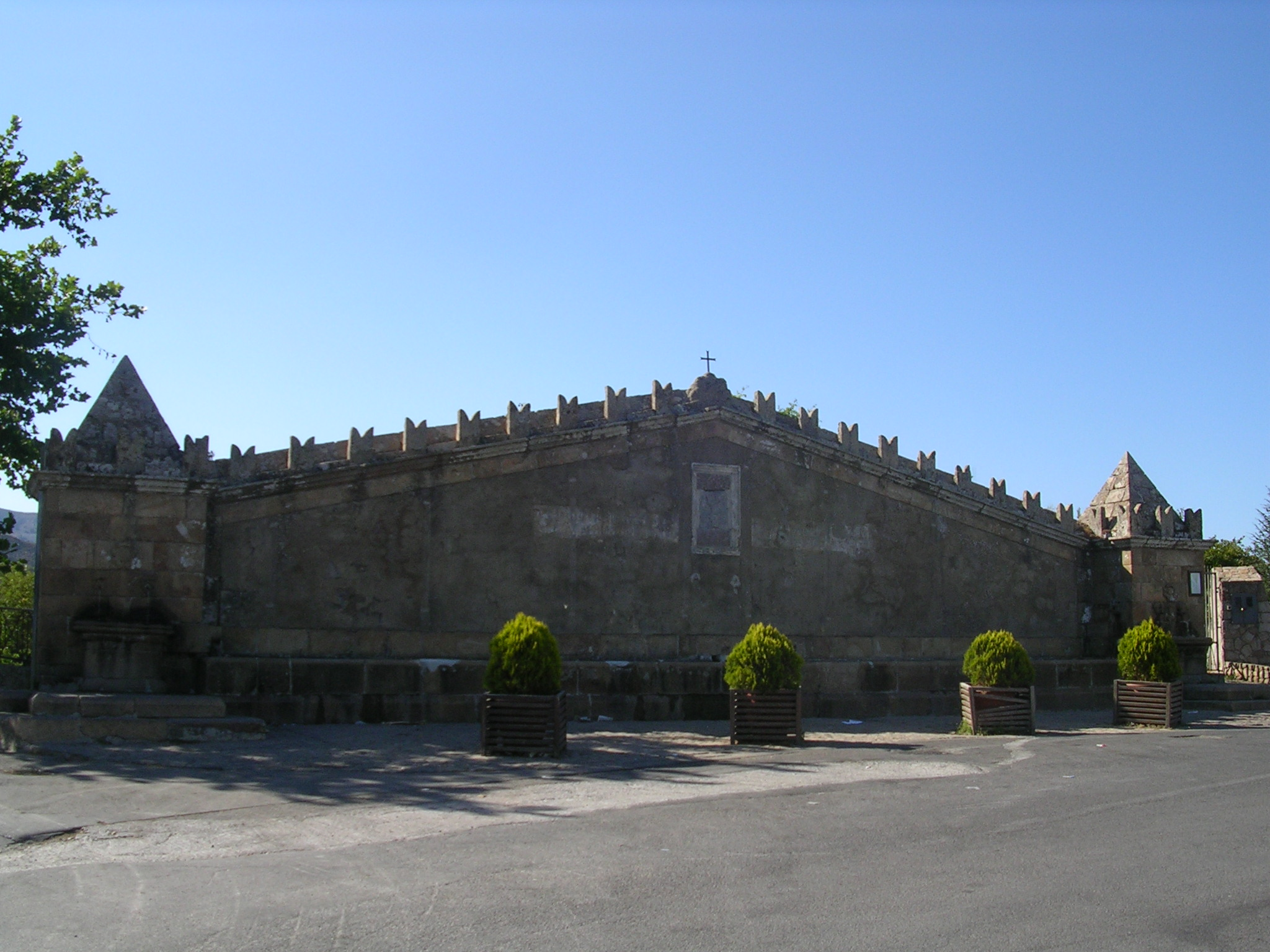 Bevaio di Geraci Siculo - Pa